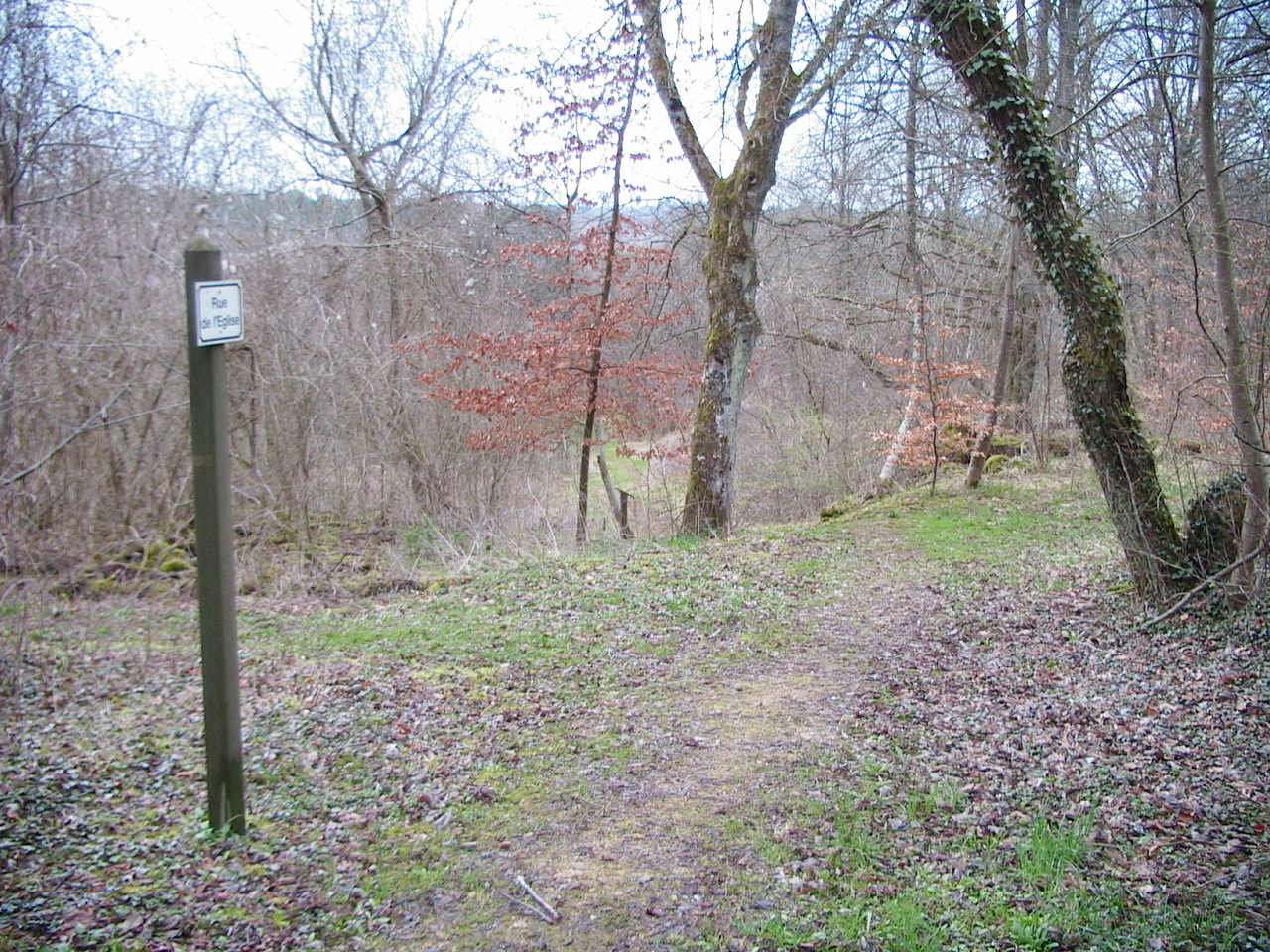 Village détruit (1914) de Réménauville, commune de Limey-Remenauville. Un sentier à l'emplacement d'une rue